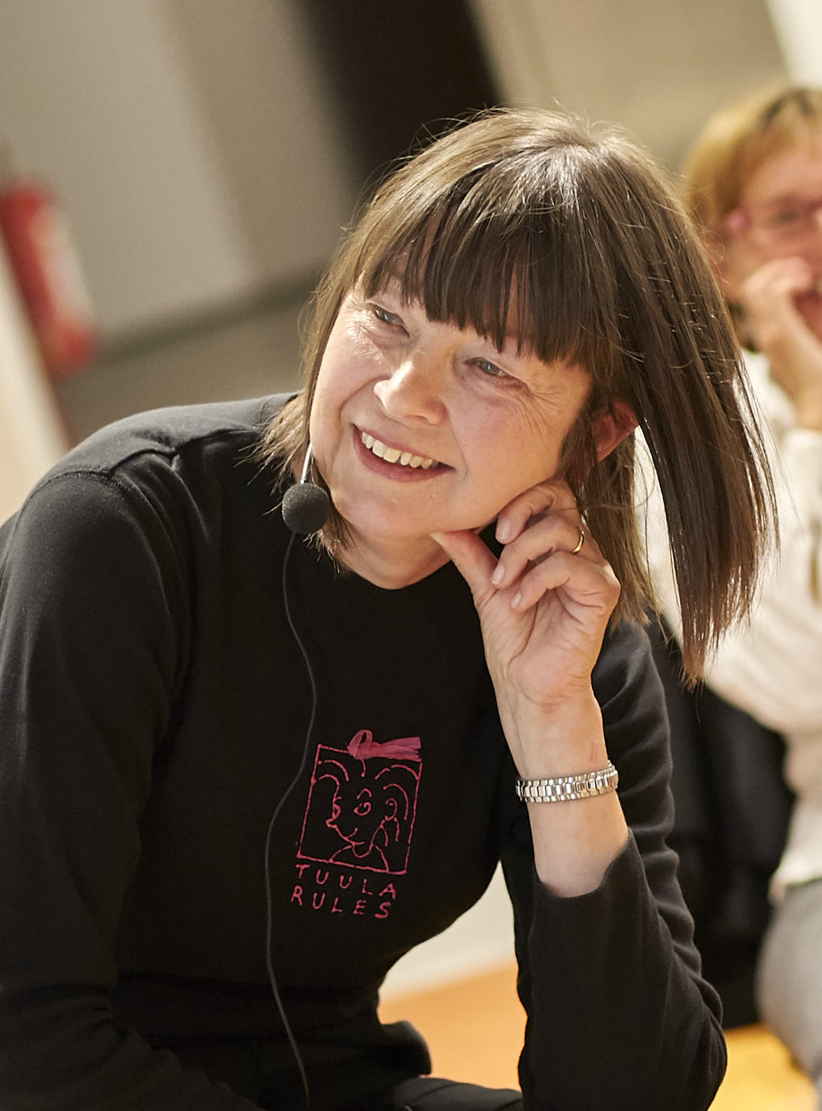 Anna Kajermo i Stockholm 2010.